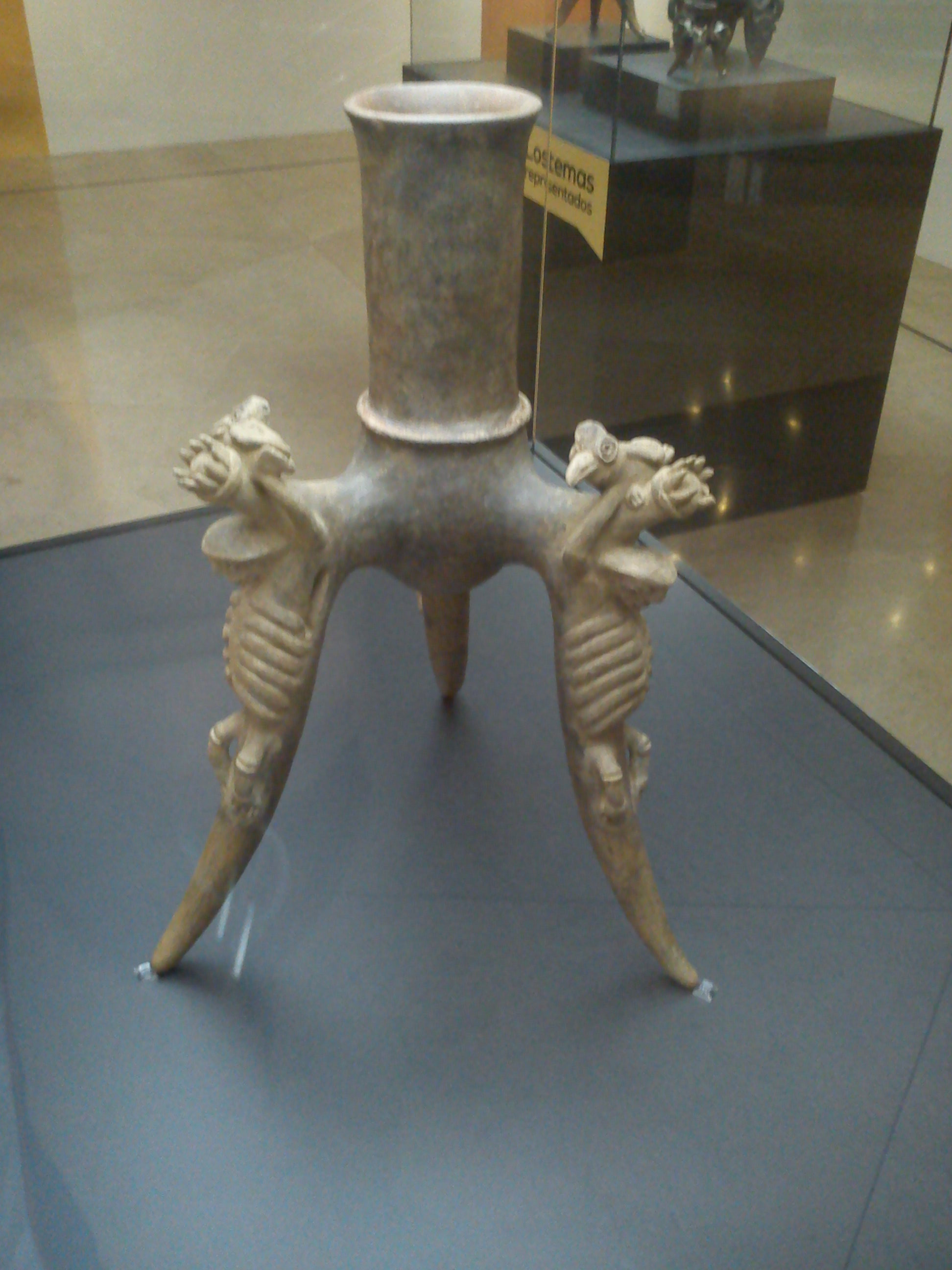 Trípode África proveniente del Caribe Central de Costa Rica, fase La Selva, 300 a 800 d.C. Se destacan los adornos de los soportes con la forma de prisioneros descarnados, cuyas cabezas son atacadas por aves de rapiña. El motivo de la muerte es característico en los trípodes África.